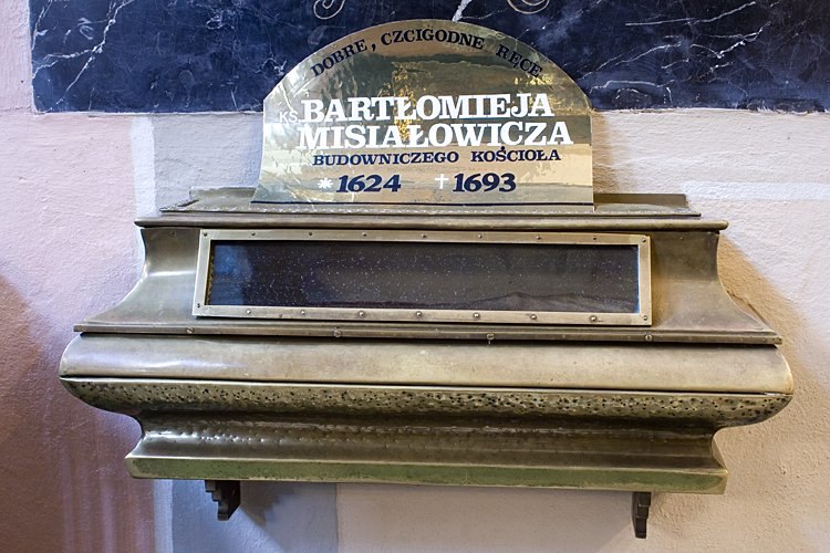 Ręce ks. Bartłomieja Misiałowicza w brzozowskiej kolegiacie.